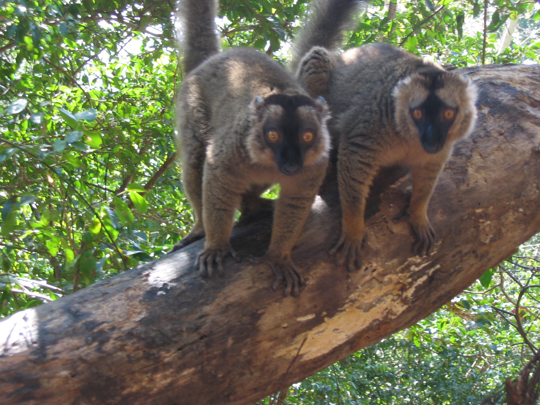 Makis sur l'îlot de Mbouzi (Mayotte)